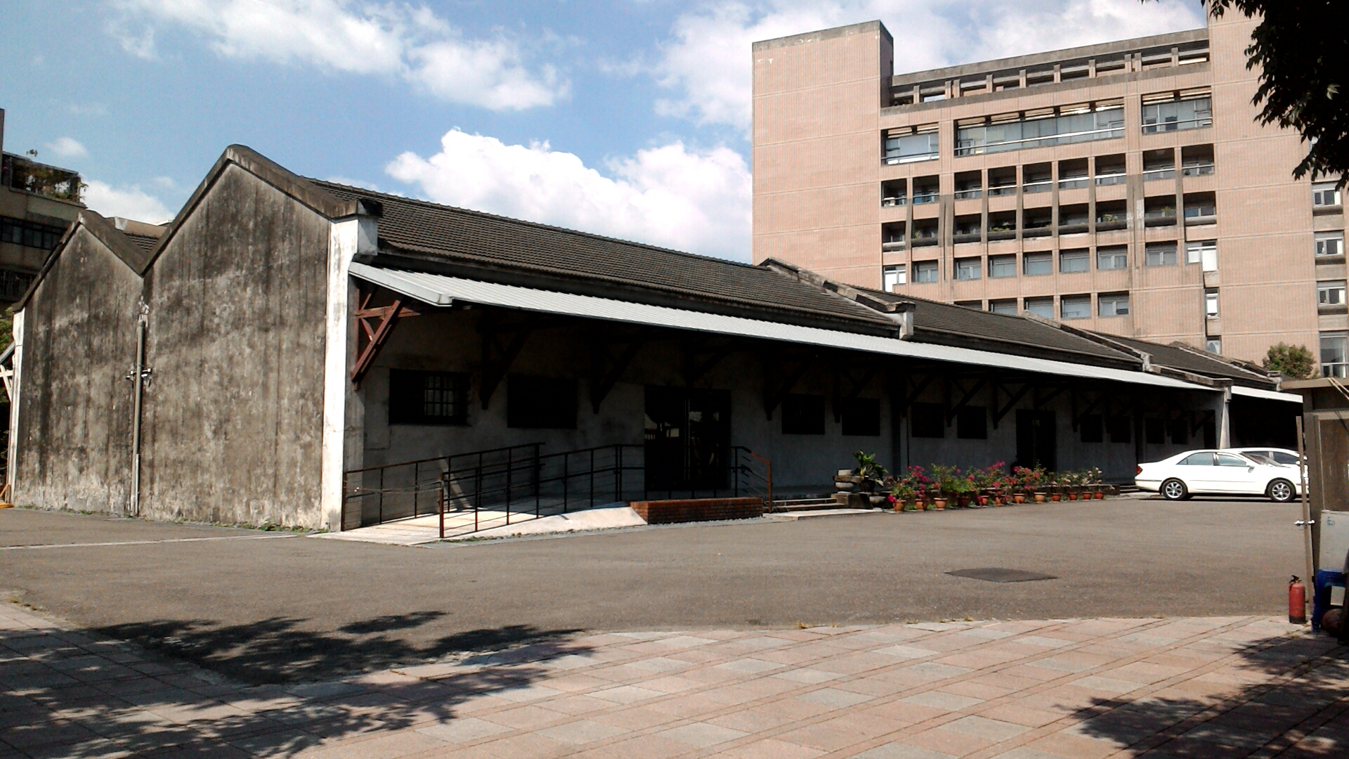 糖廍文化園區C棟倉庫,台北市萬華區大理次分區糖廍里